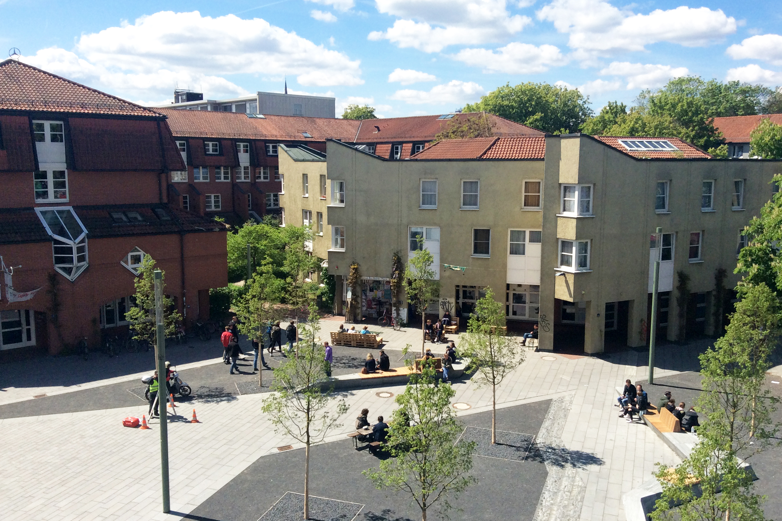 Der westliche Vorplatz des Campus Center auf dem zentralen Campus Holländischer Platz.